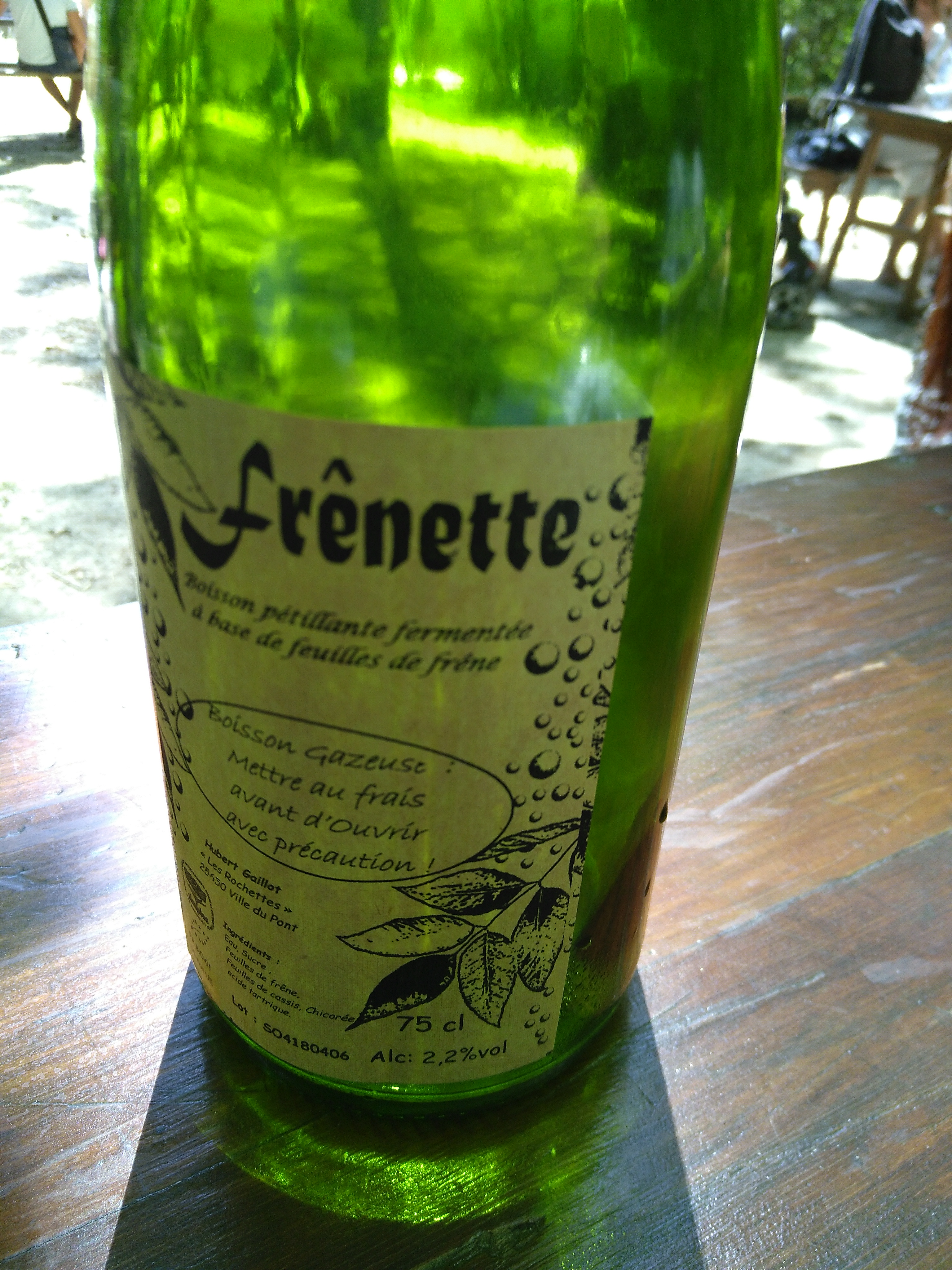 Bouteille de frênette (alcool très léger produit par la fermentation de feuilles de frêne). On appelle parfois la frênette « le cidre du pauvre ». Achetée lors d'une fête en forêt de Chaux (Franche-Comté).